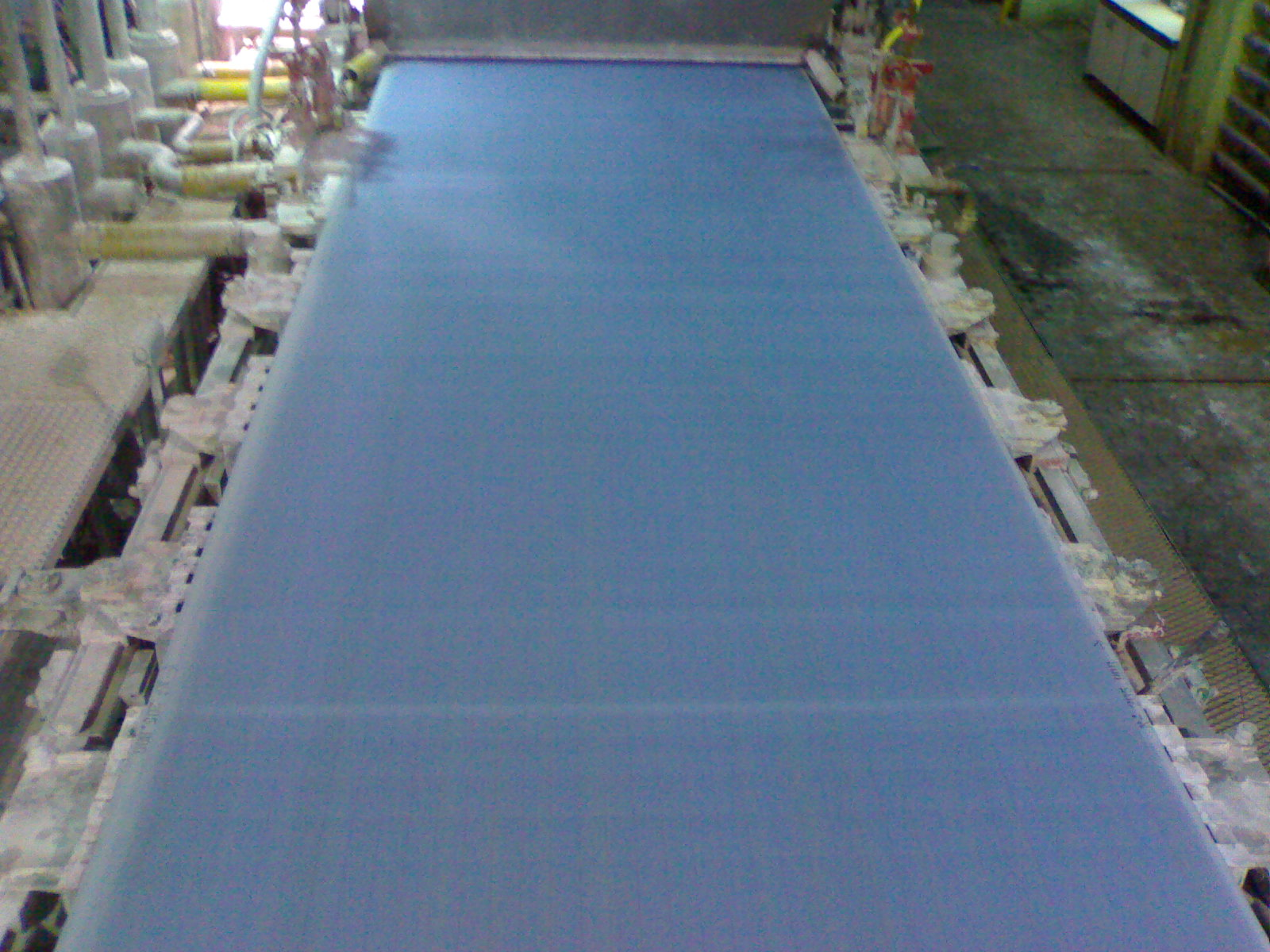 Tela, maquina de papel